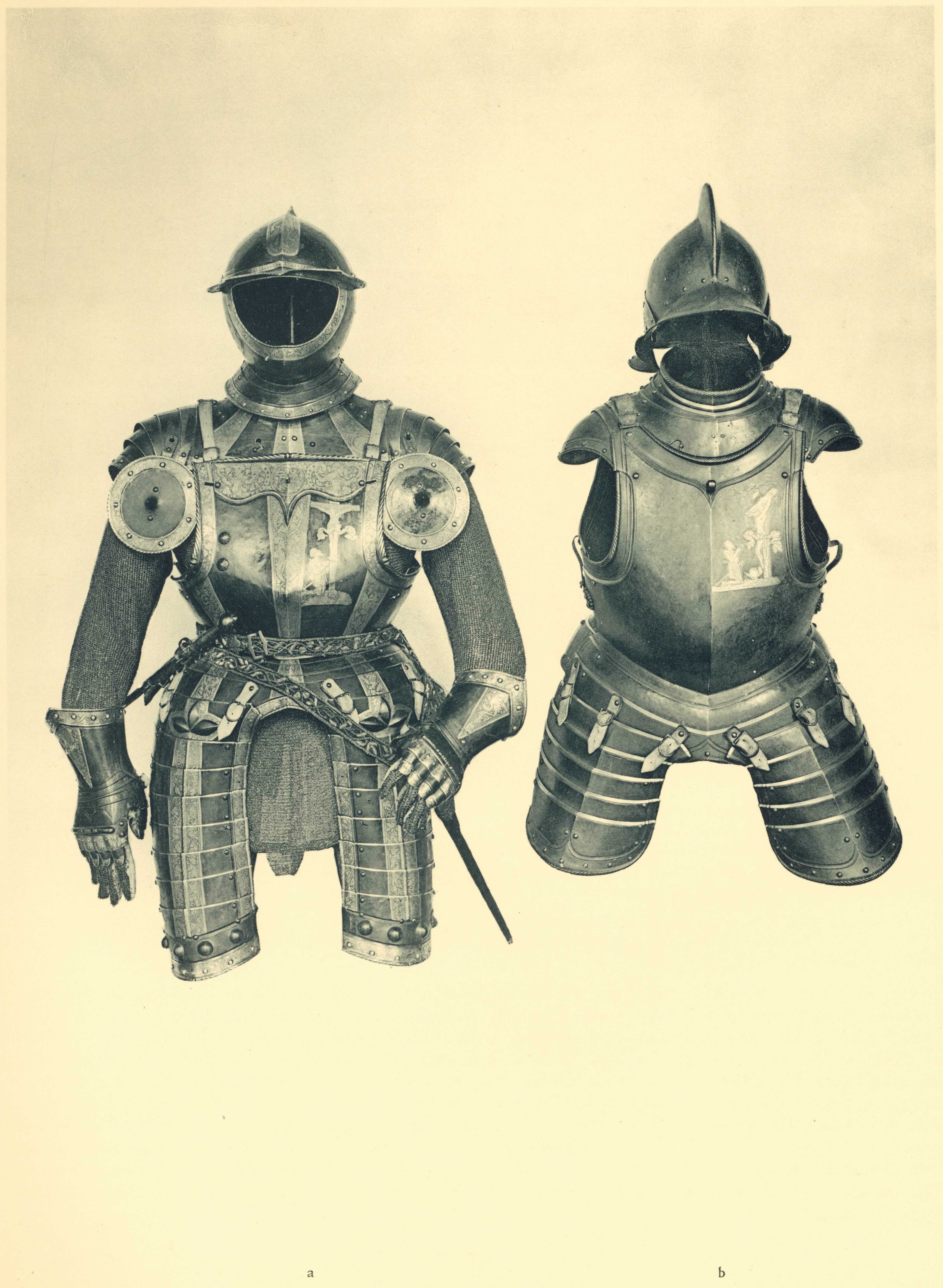 2 Trabharnische des Kurfürsten August von Sachsen (1526–1586)